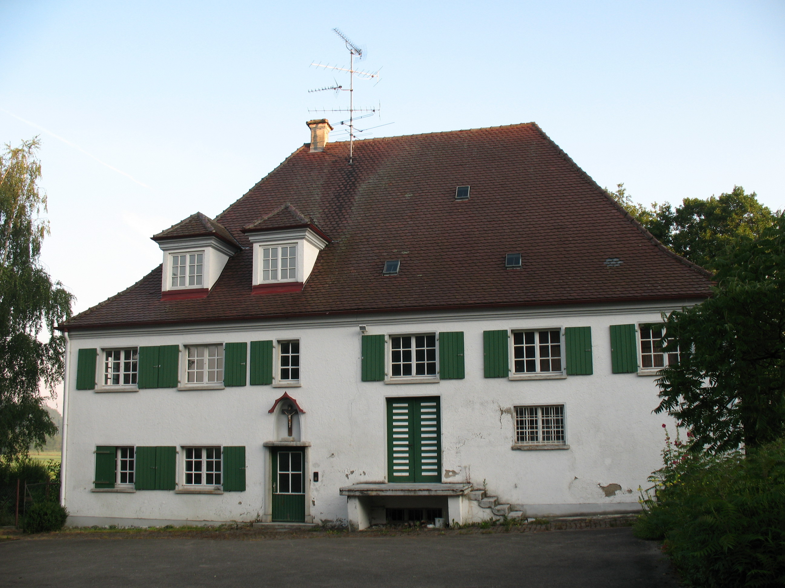 Gebäude der ehemaligen Mühle des Klosters Heggbach. Die Mühle befindet sich nordwestlich des Klosters Richtung Maselheim